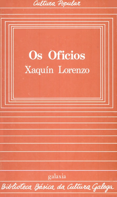 Biblioteca Básica da Cultura Galega, 14, Os oficios, Xaquín Lorenzo